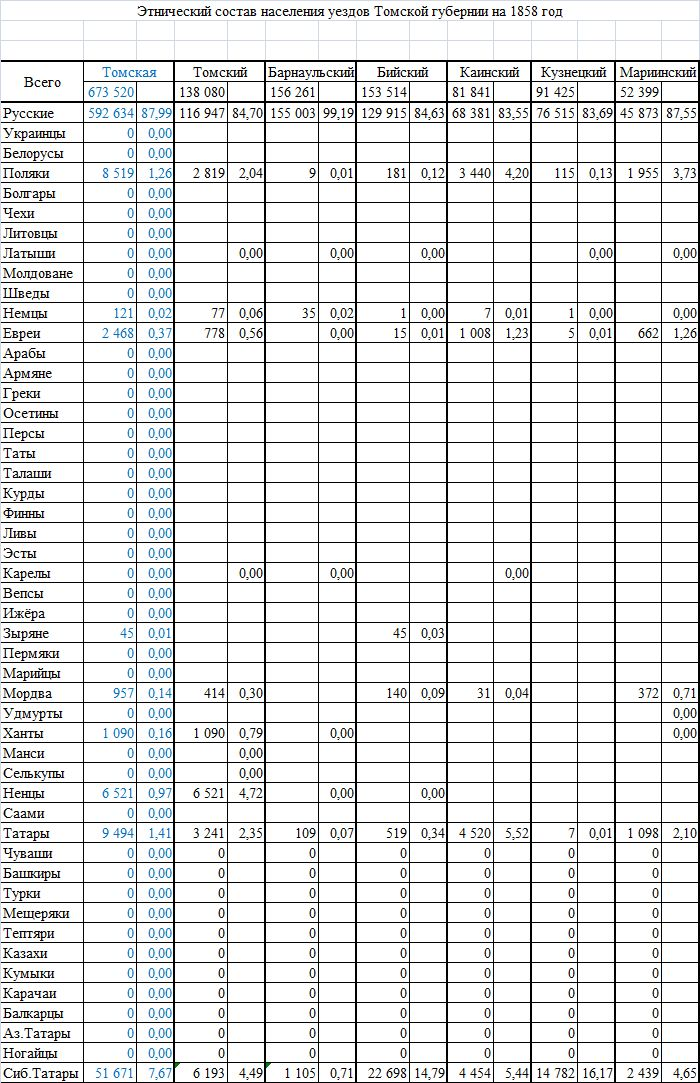 Список населённых мест Томской губернии